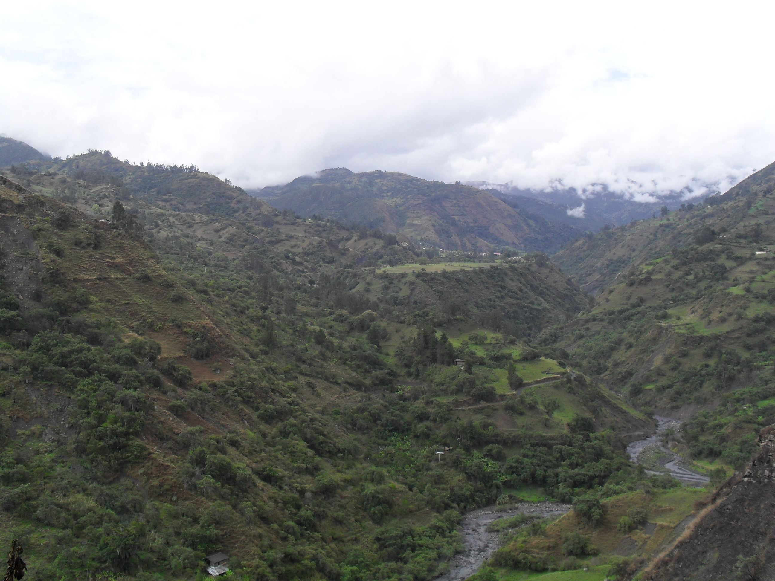 Río Chiscano, municipio de Chiscas, departamento de Boyacá, Colombia